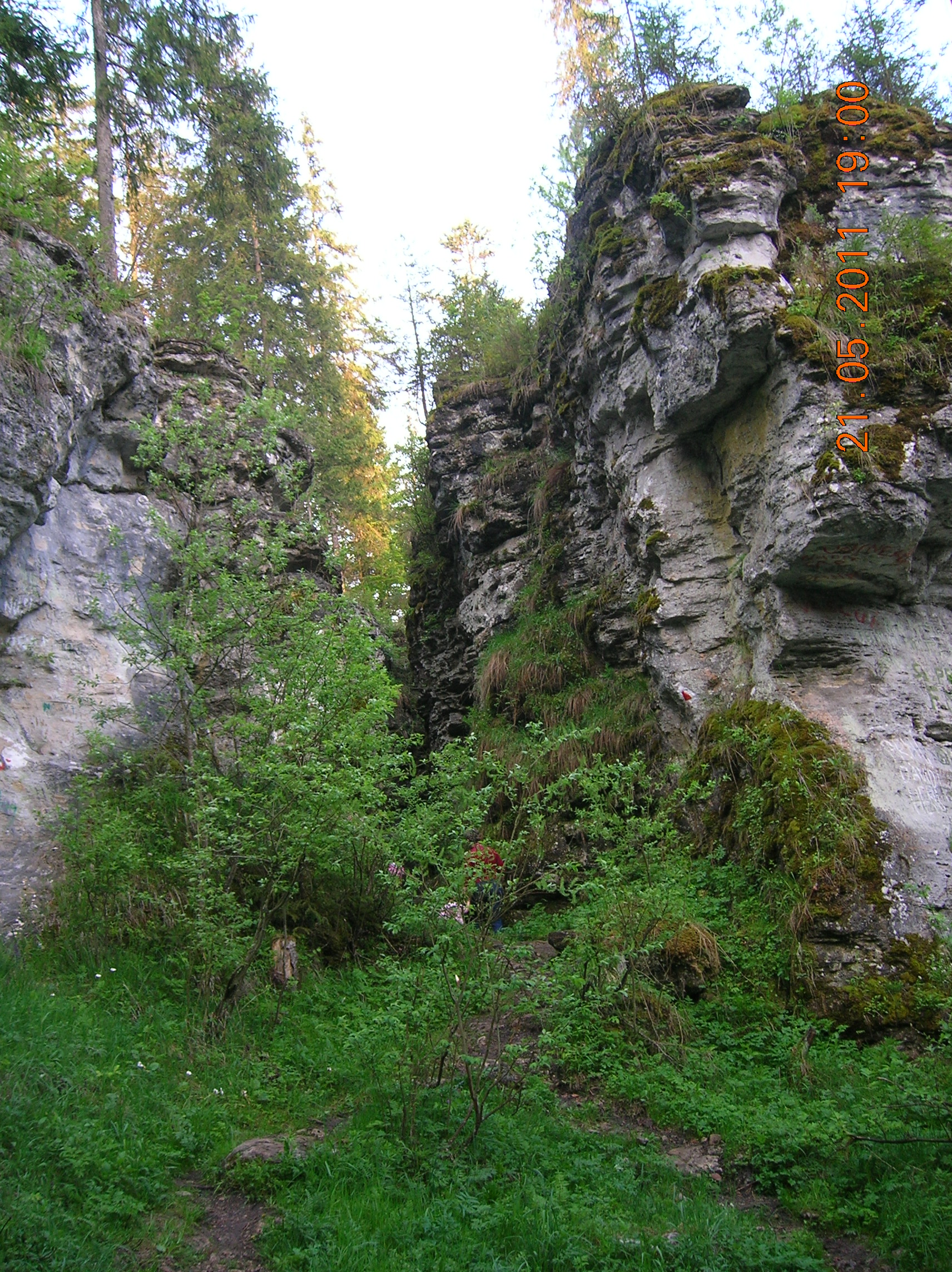 Jud. Harghita, Oraş Borsec, Rezervaţia Scaunul Rotund, Grota Urşilor, vara